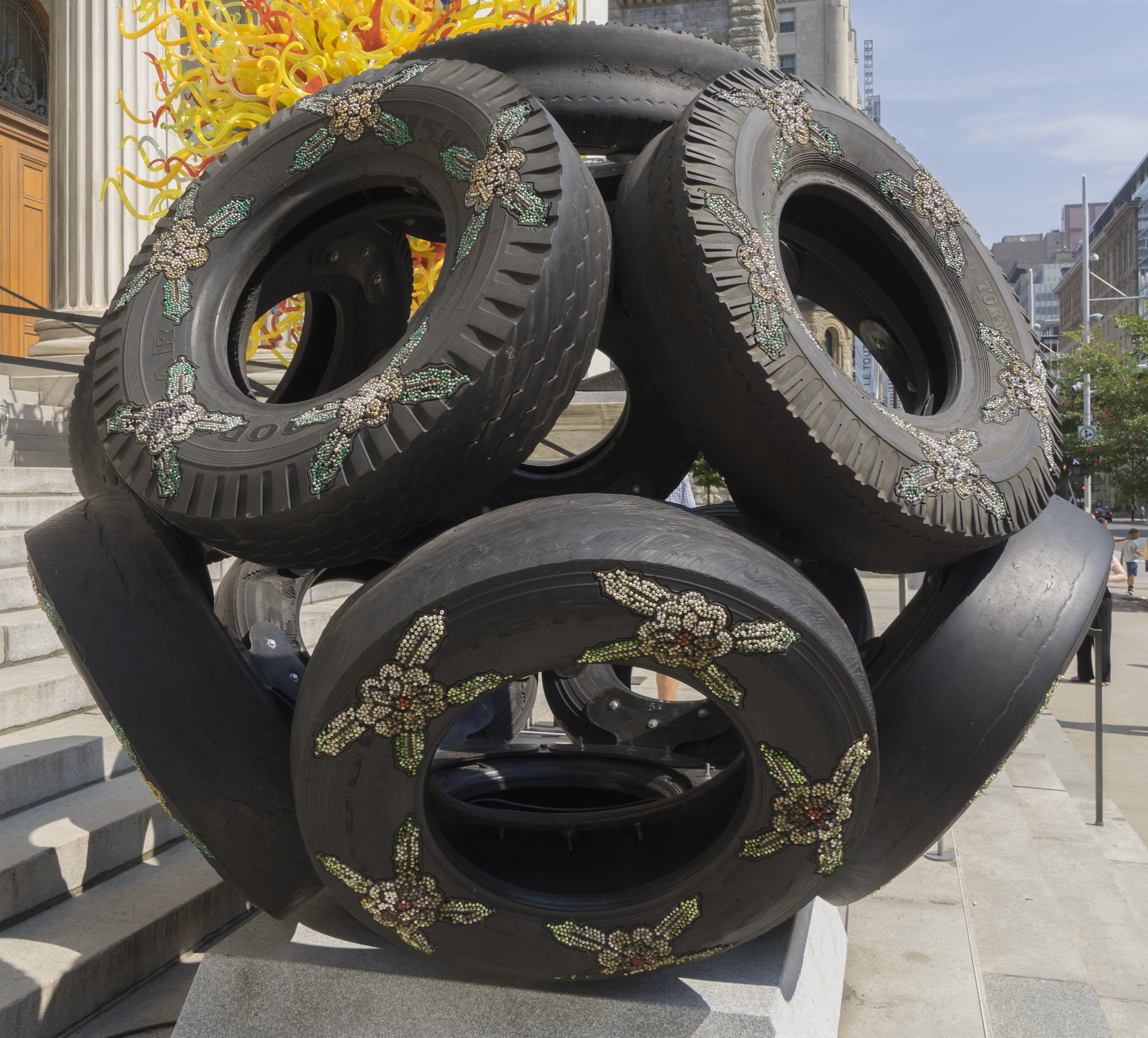 Betsabeé Romero, Tribute to Wirikuta, 2011